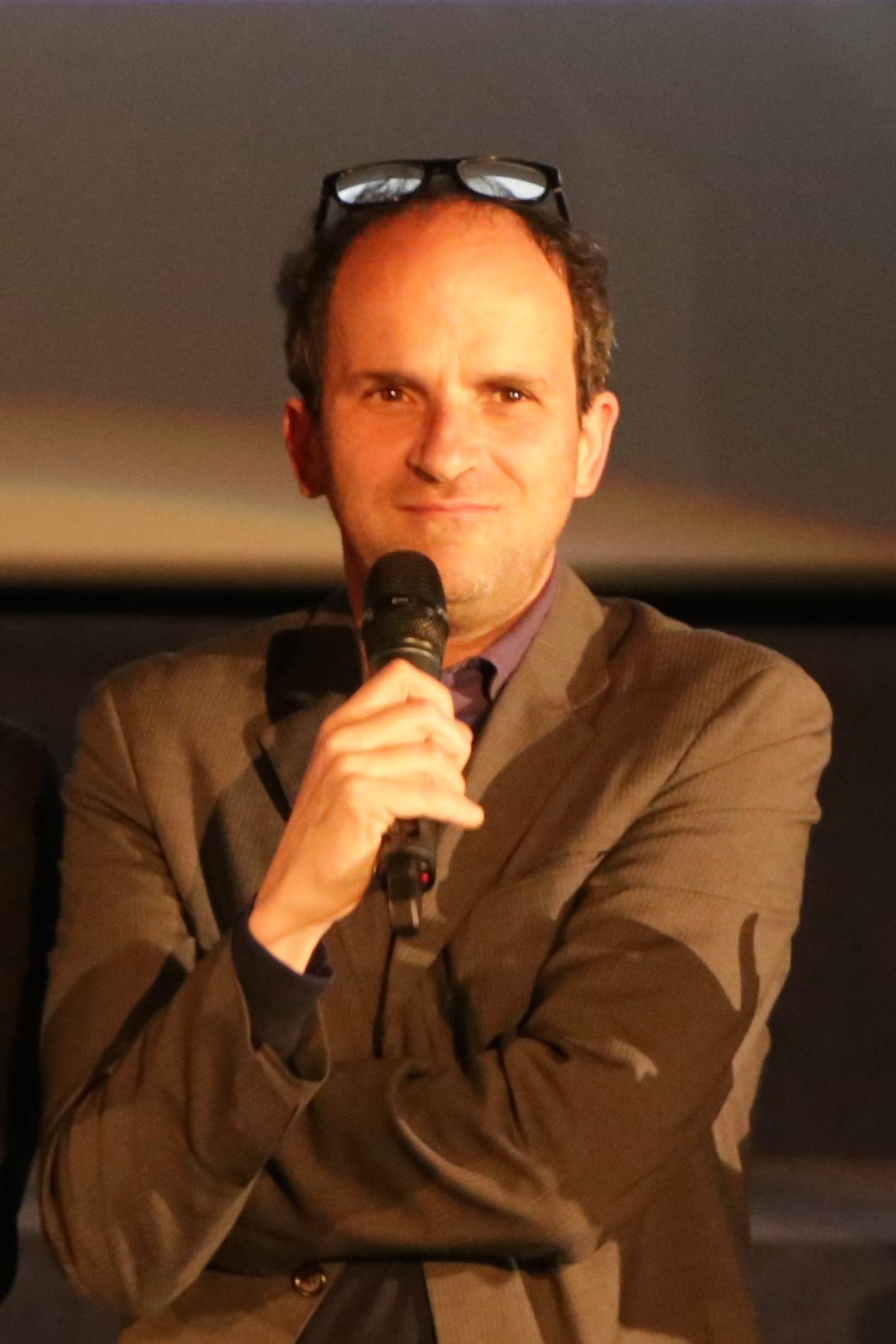 Lors de l'avant 1er du film Barbecue